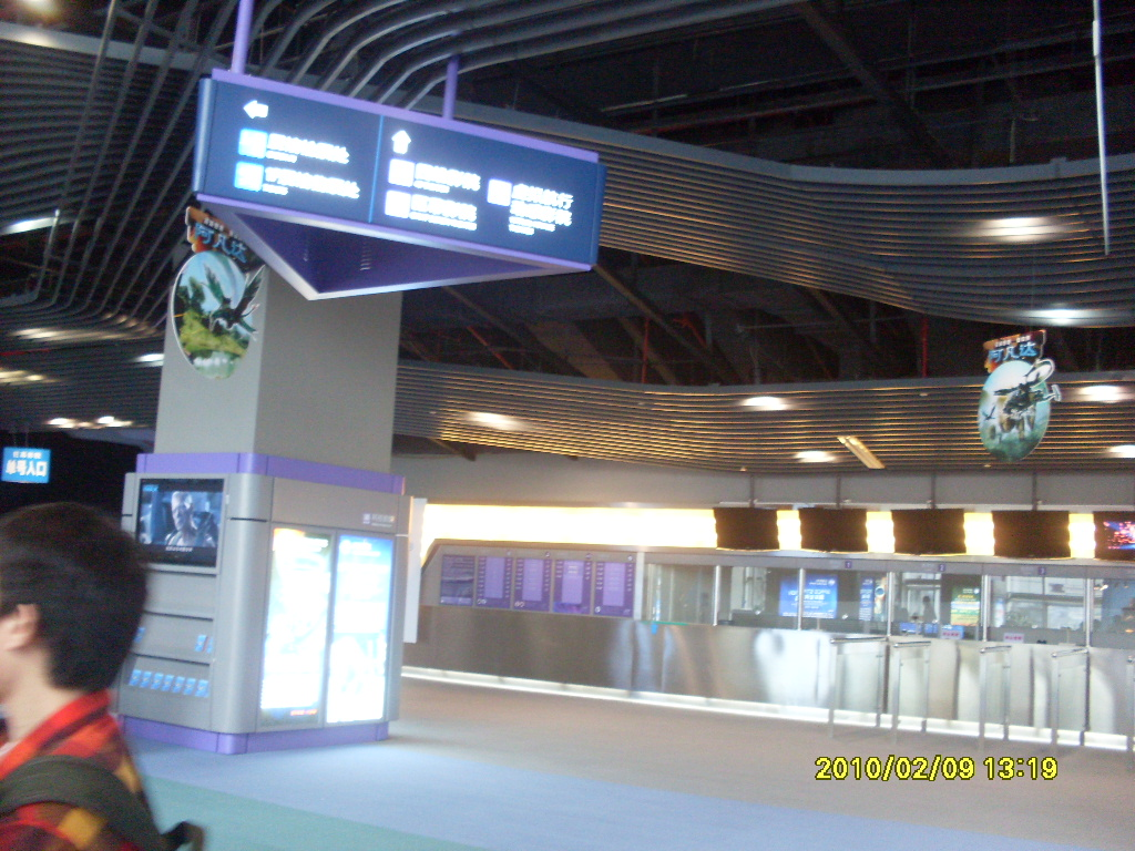 廣東科學中心的IMAX影院